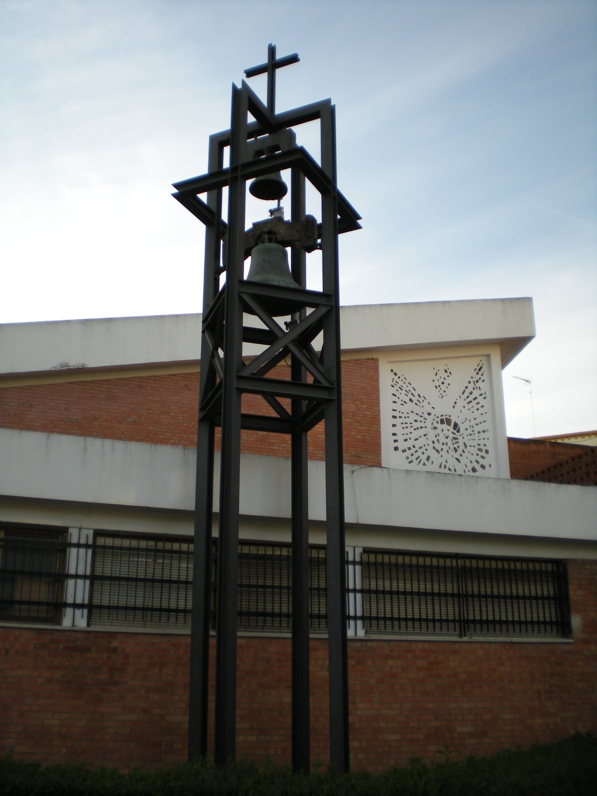 Cmpanario de la iglesia de Ntra. Sra. de Fátima en Jerez de la Frontera (Cádiz - España)